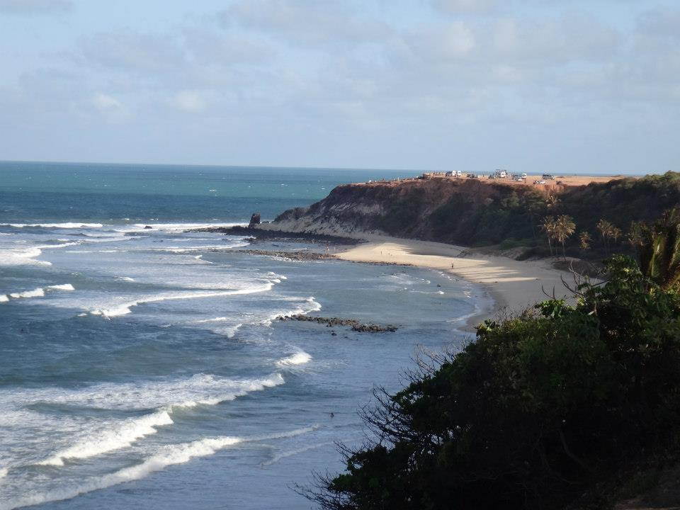 Praia do Amor em Tibau do Sul (RN)